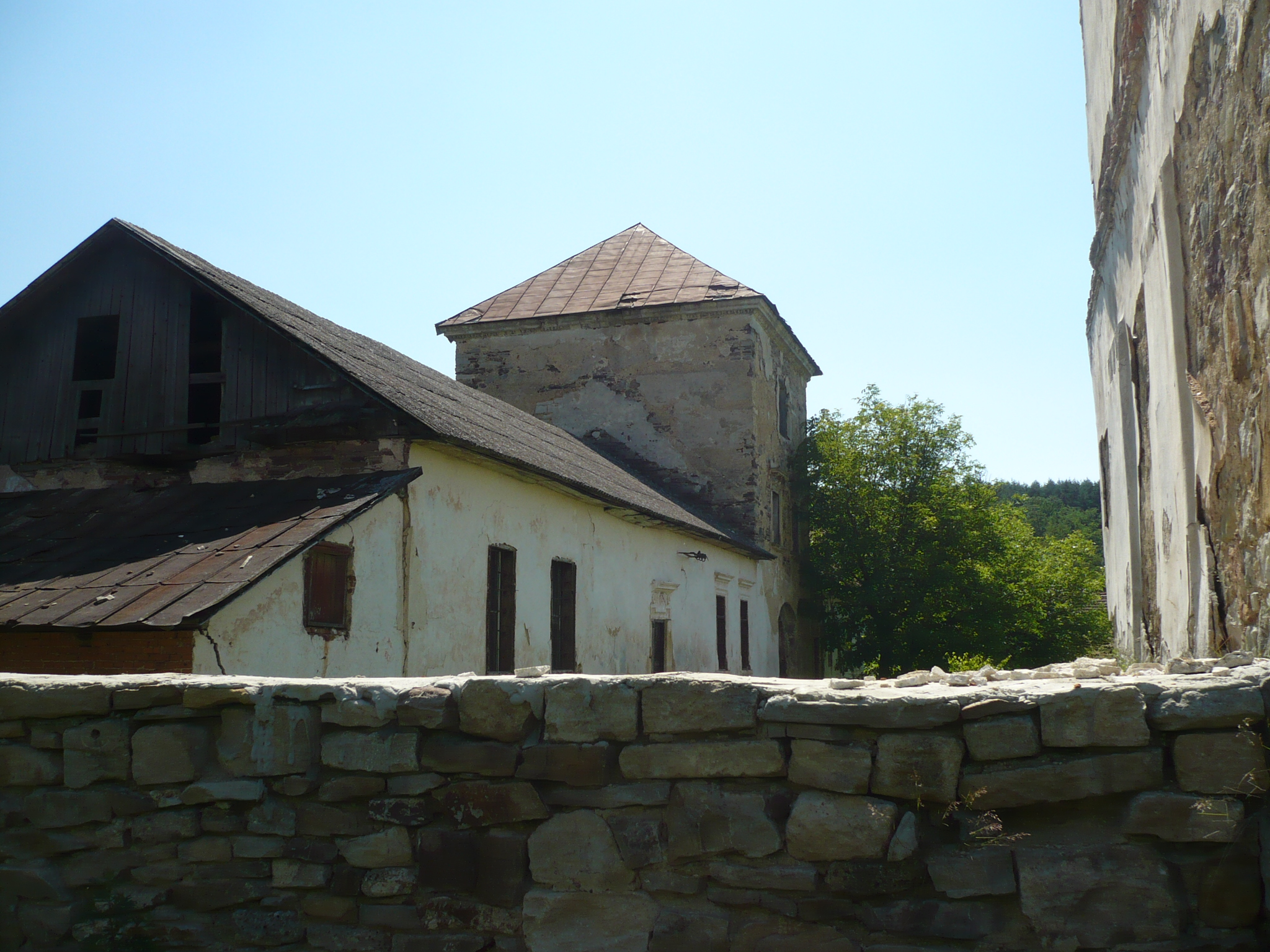 Potok Złoty. Zamek